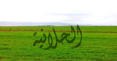 بلدة لبنانية